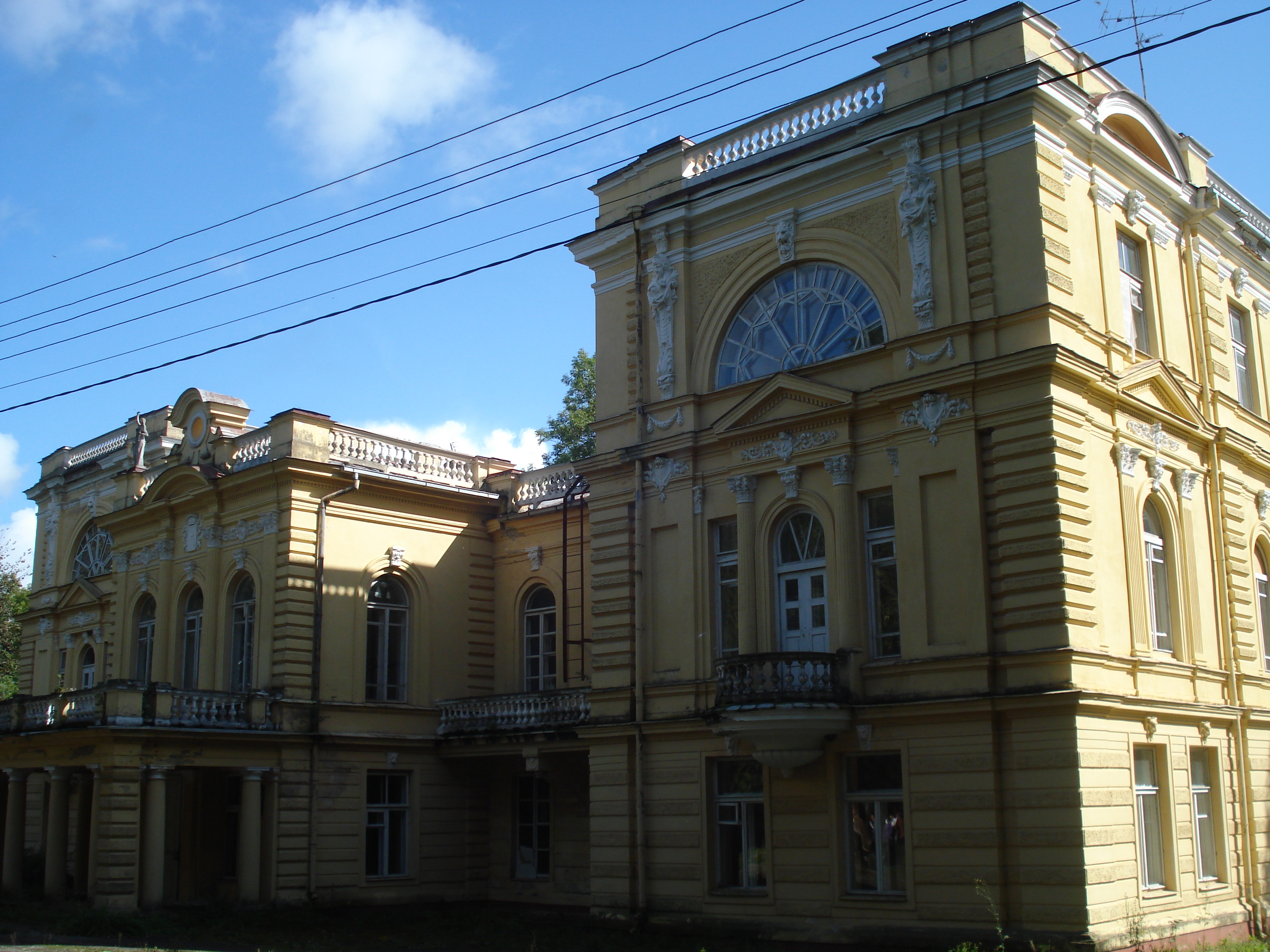 Apytalaukio dvaro rūmai, XVII-XVIII a. architektūros paminklas. Pagrindinis fasadas